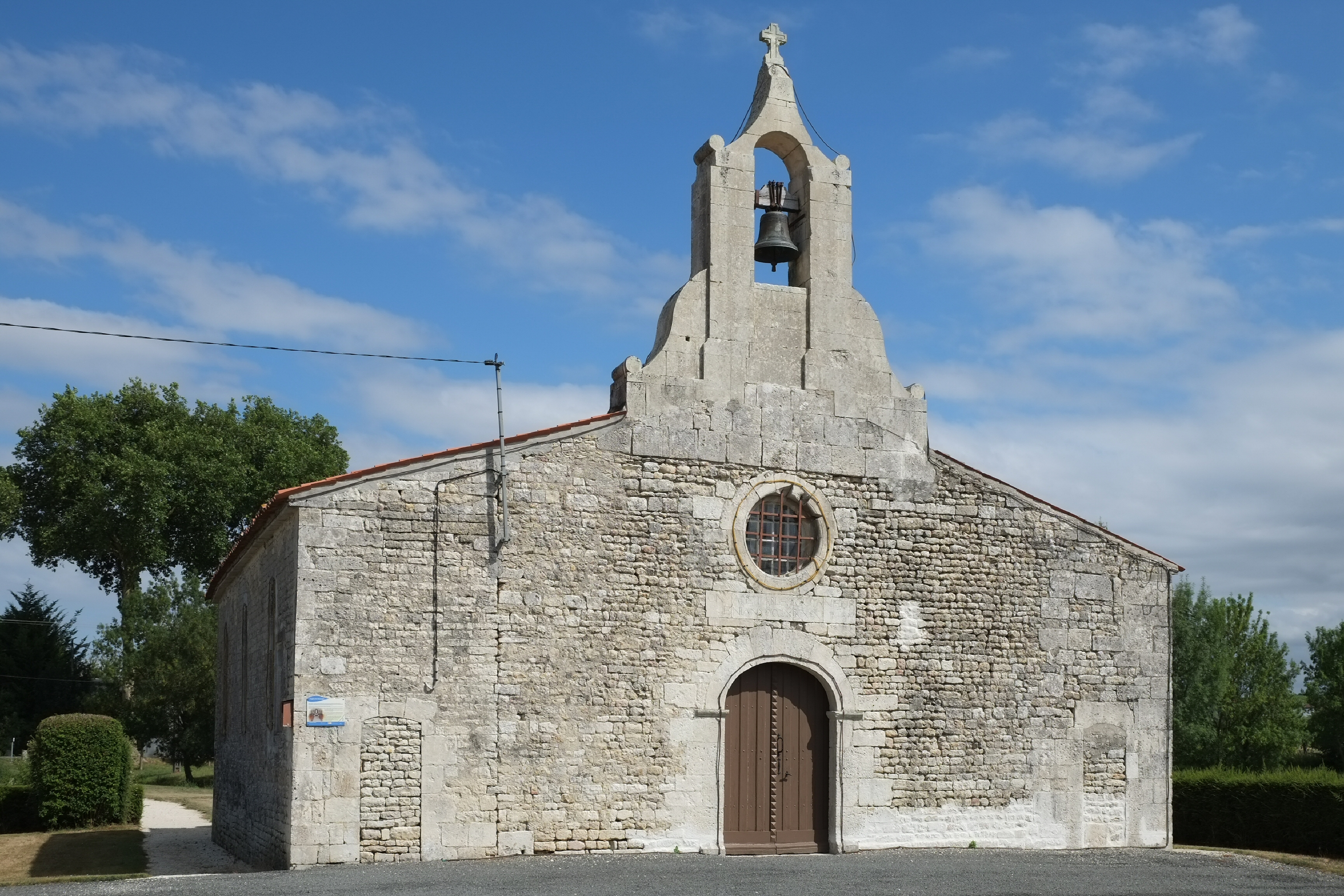 Église Saint-Martin Bazauges Charente-Maritime France